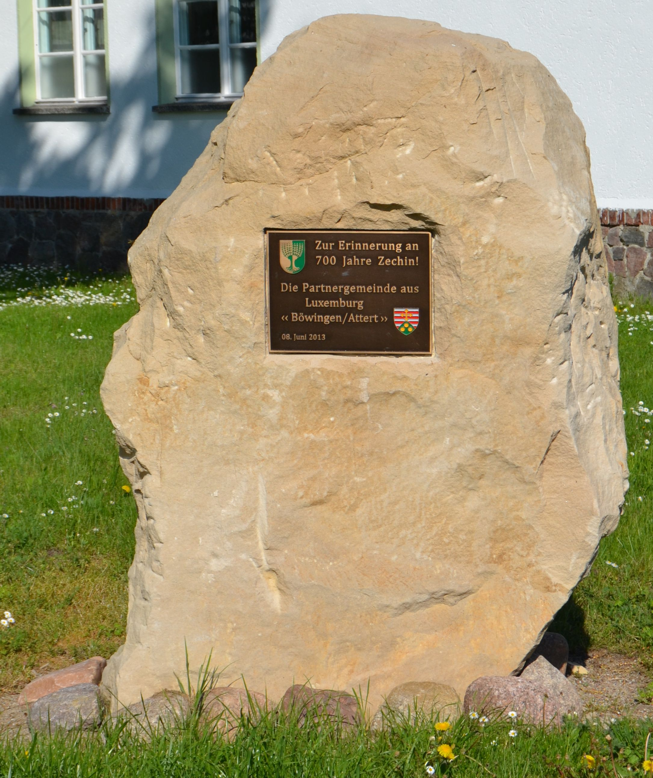 Gedenkstein an die 700-Jahr-Feier von Zechin.